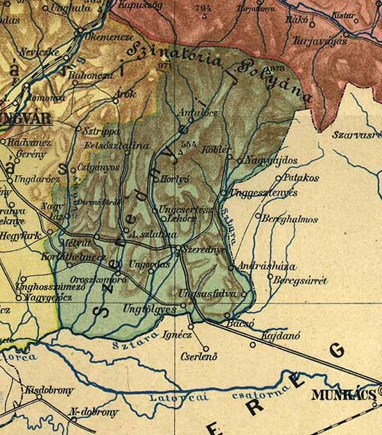 Середнянський повіт (Округ) у складі Ужанського комітату